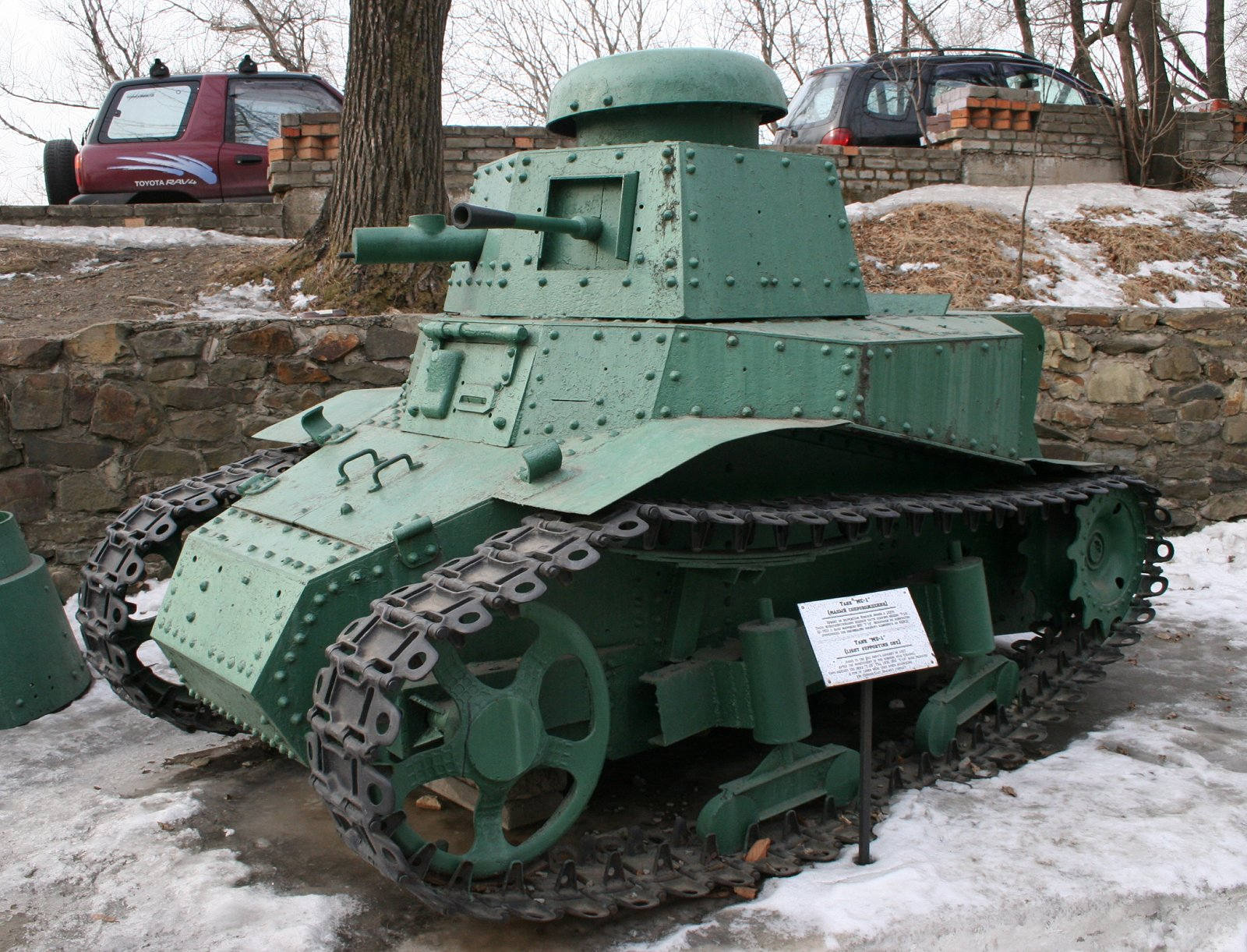 Танк МС-1 из состава Особой Дальневосточной армии на открытой площадке Музея Краснознаменного Тихоокеанского флота (Владивосток)